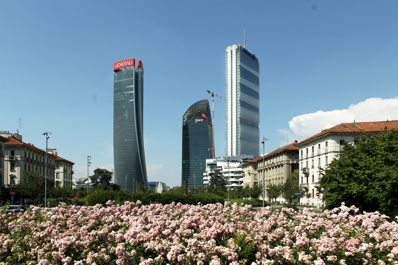 Veduta delle tre torri del quartiere Citylife a Milano. L'immagine è scattata dal piazzale Giulio Cesare.